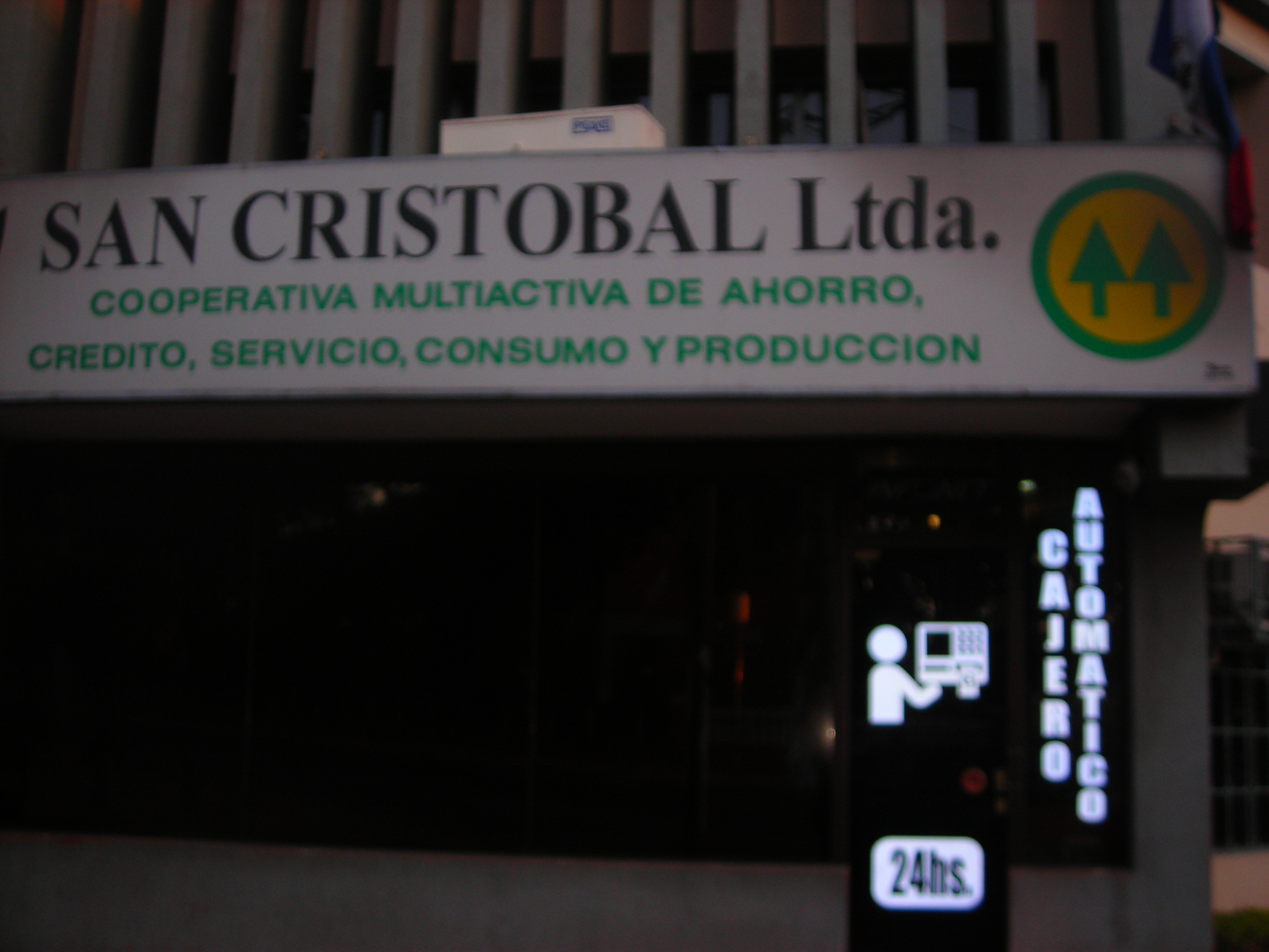 Cooperativa